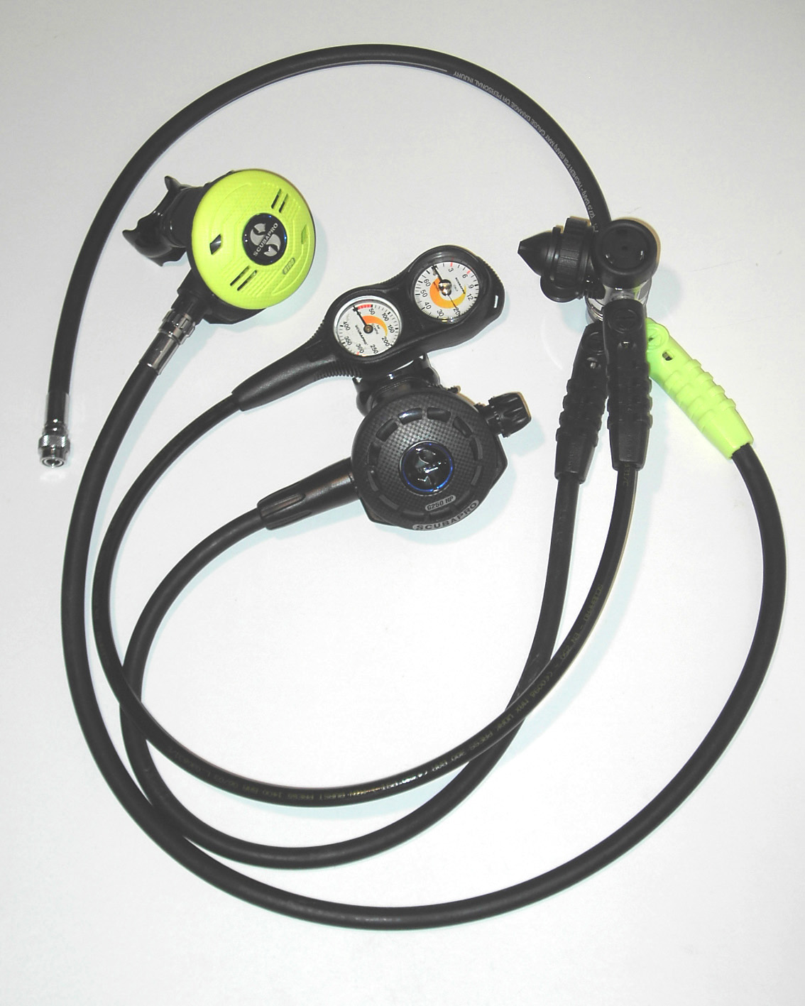 Diving equipment